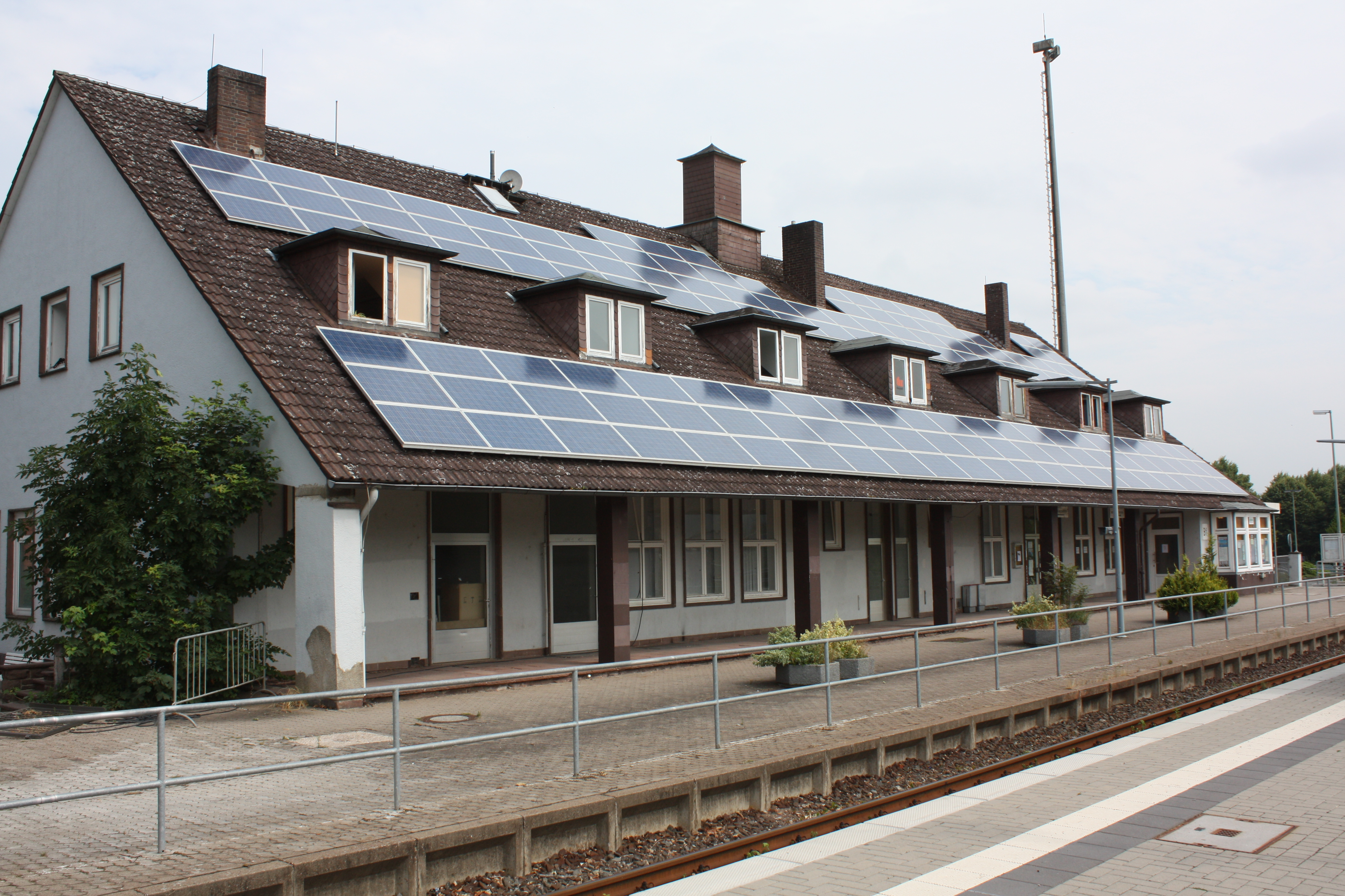 Hauptbahnhof in Brakel